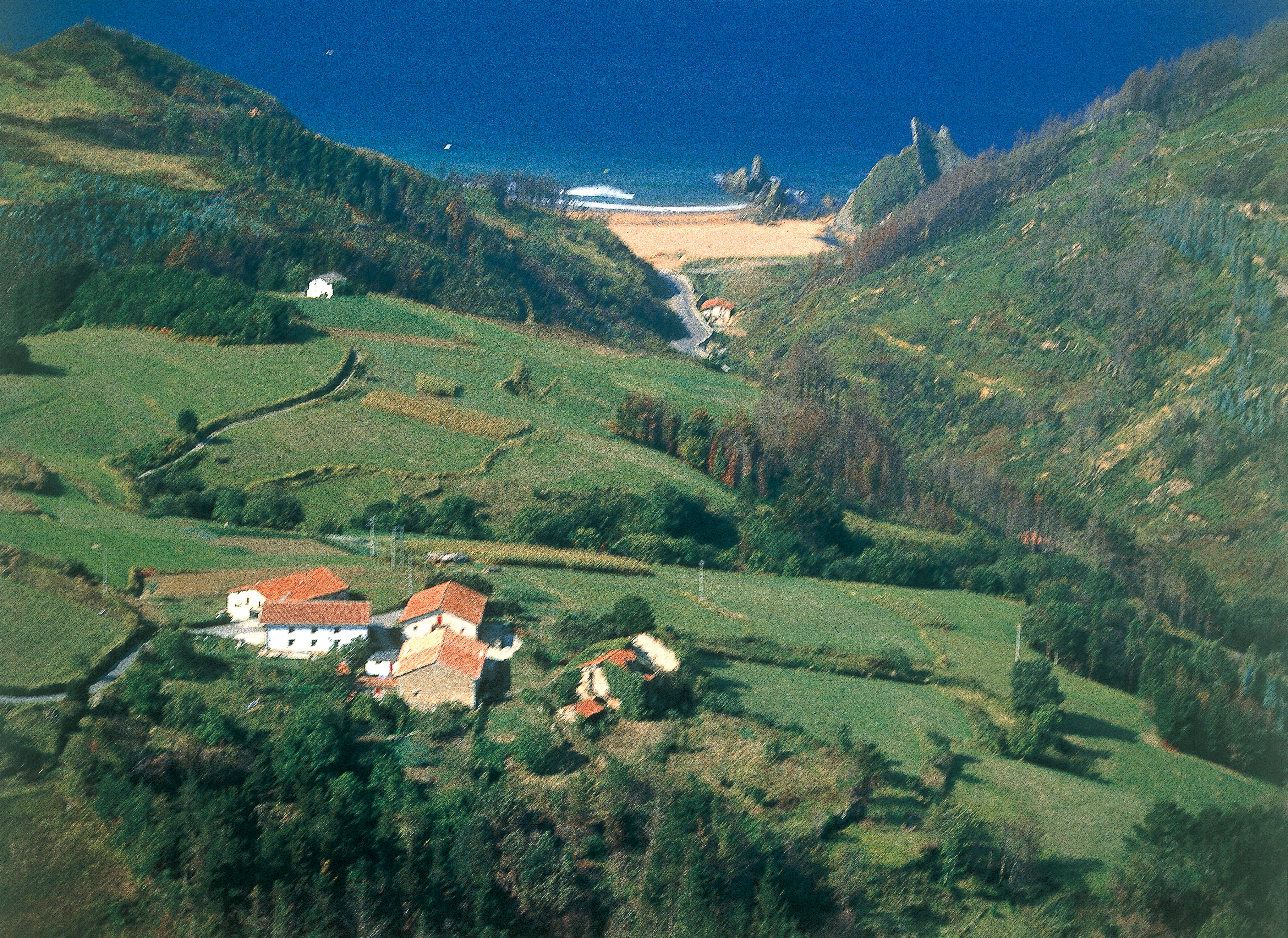 Gendika auzoa (Ibarrangelu, Bizkaia) eta Laga hondartza.